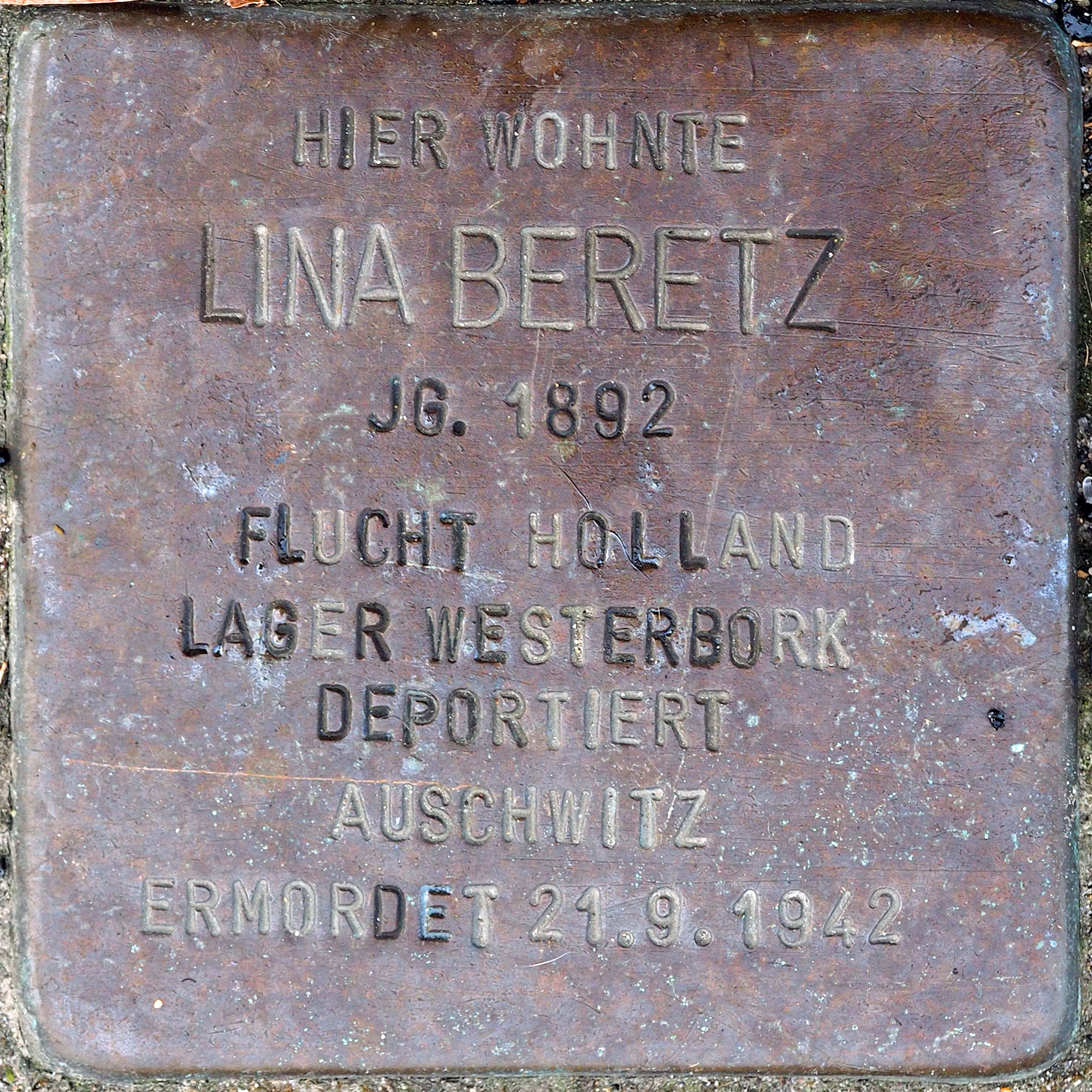 Stolpersteine MG: Berentz, Lina